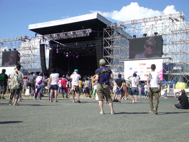 2010年サマーソニック大阪会場スカイステージとまばらな観衆。